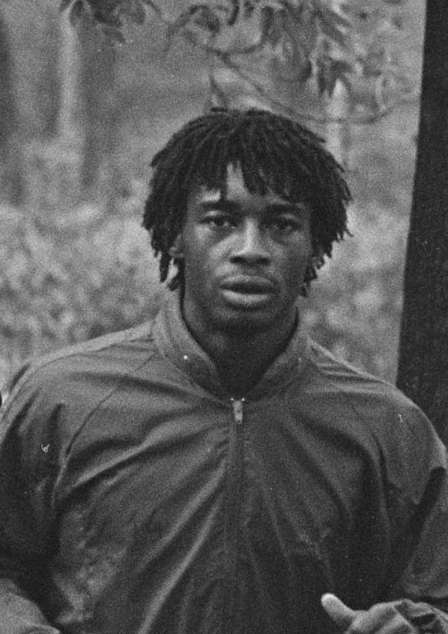 Collectie / Archief : Fotocollectie Anefo Reportage / Serie : [ onbekend ] Beschrijving : Training Feijenoord ivm Uefa-Cup-wedstrijd tegen Borussia Mönchen-Gladbach; midden Peter Barendse, rechts Blinker, links Tahamata en Wijnstekers / Datum : 3 november 1986 Trefwoorden : sport, trainingen, voetballers Persoonsnaam : Peter Barendse, Tahamata, Simon Instellingsnaam : Feyenoord Fotograaf : Bogaerts, Rob / Anefo, [onbekend] Auteursrechthebbende : Nationaal Archief Materiaalsoort : Negatief (zwart/wit) Nummer archiefinventaris : bekijk toegang 2.24.01.05 Bestanddeelnummer : 933-8035